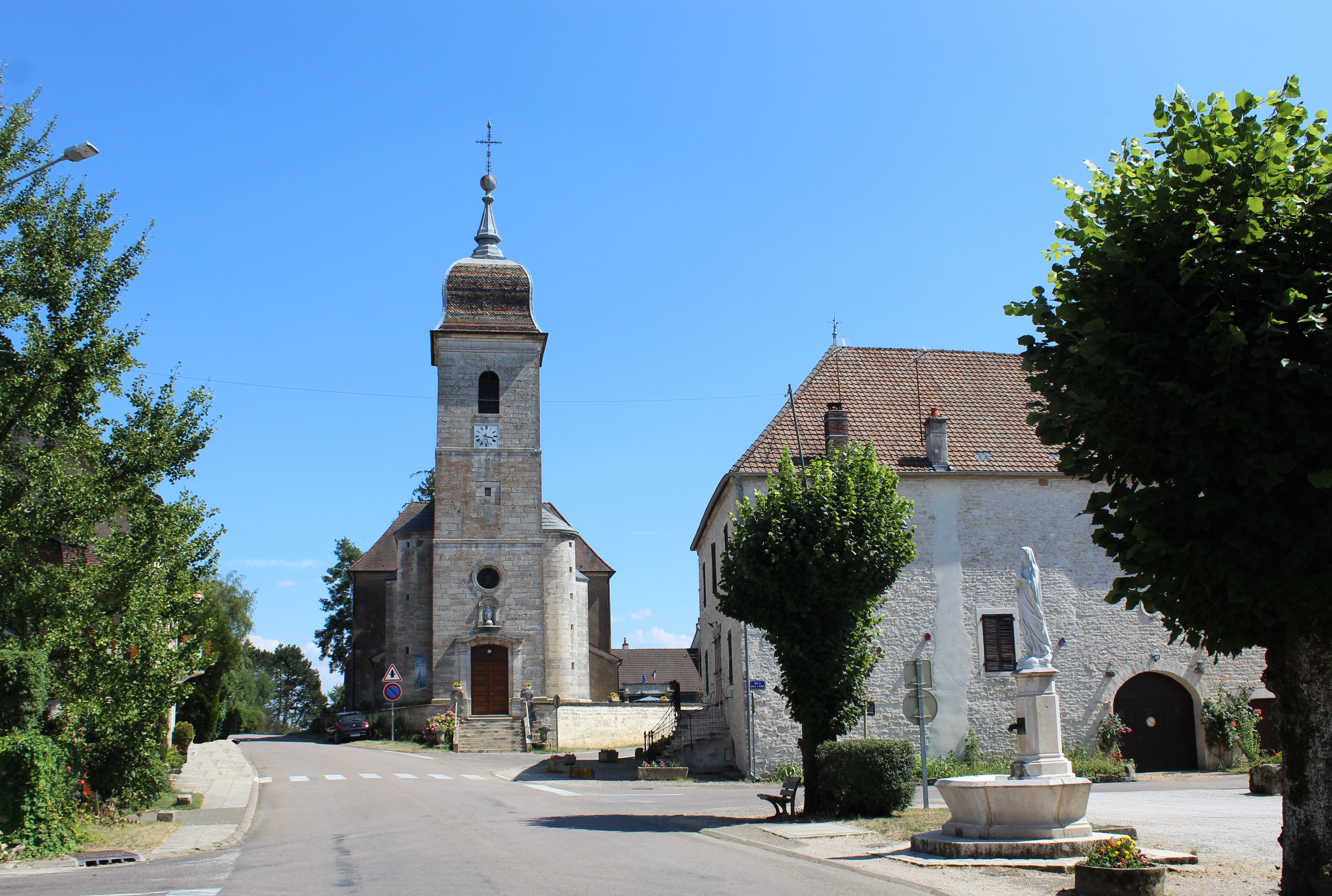 Place de l'église.